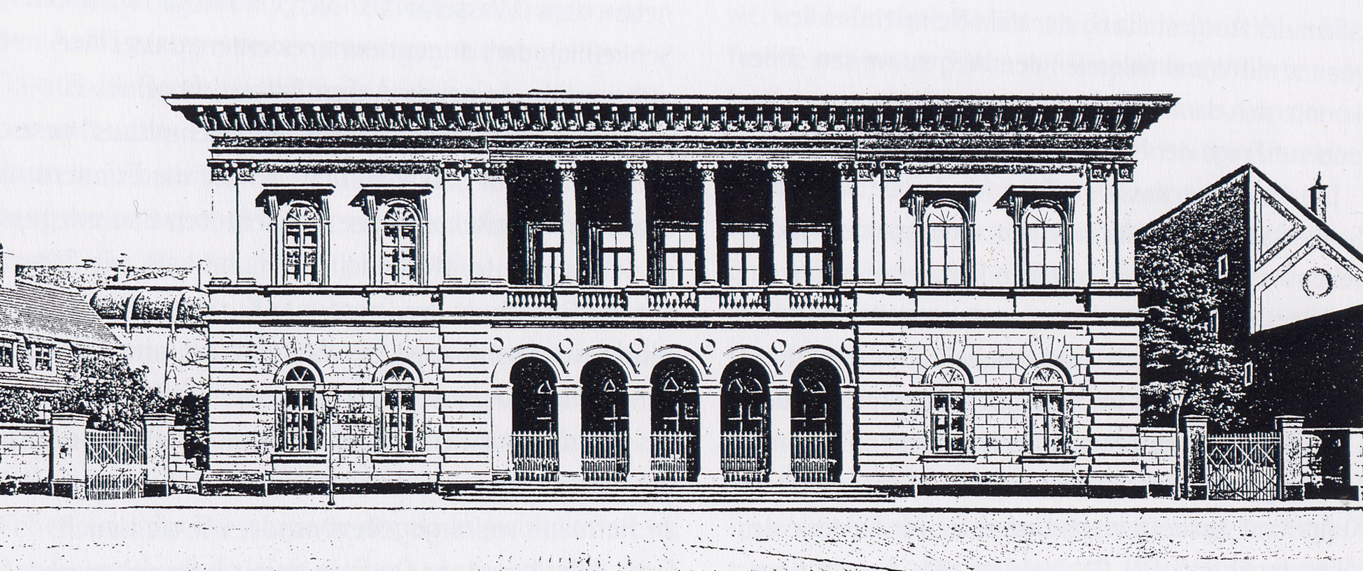 Römisches Haus in Leipzig, Woldemar Hermann